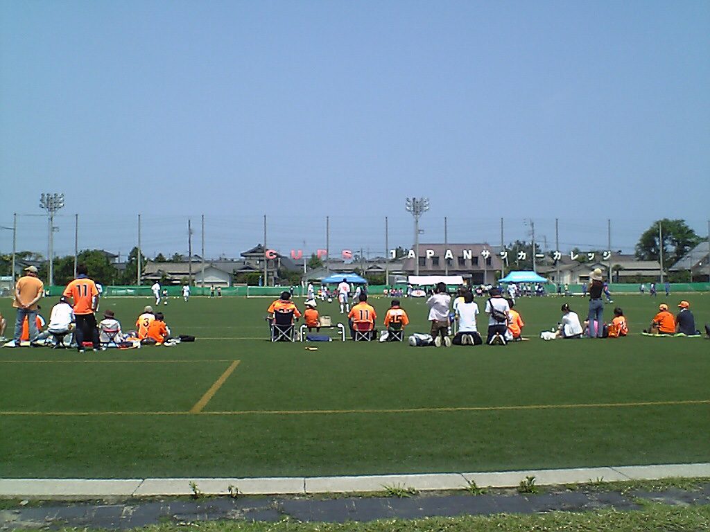 AC NAGANO PARCEIRO away game